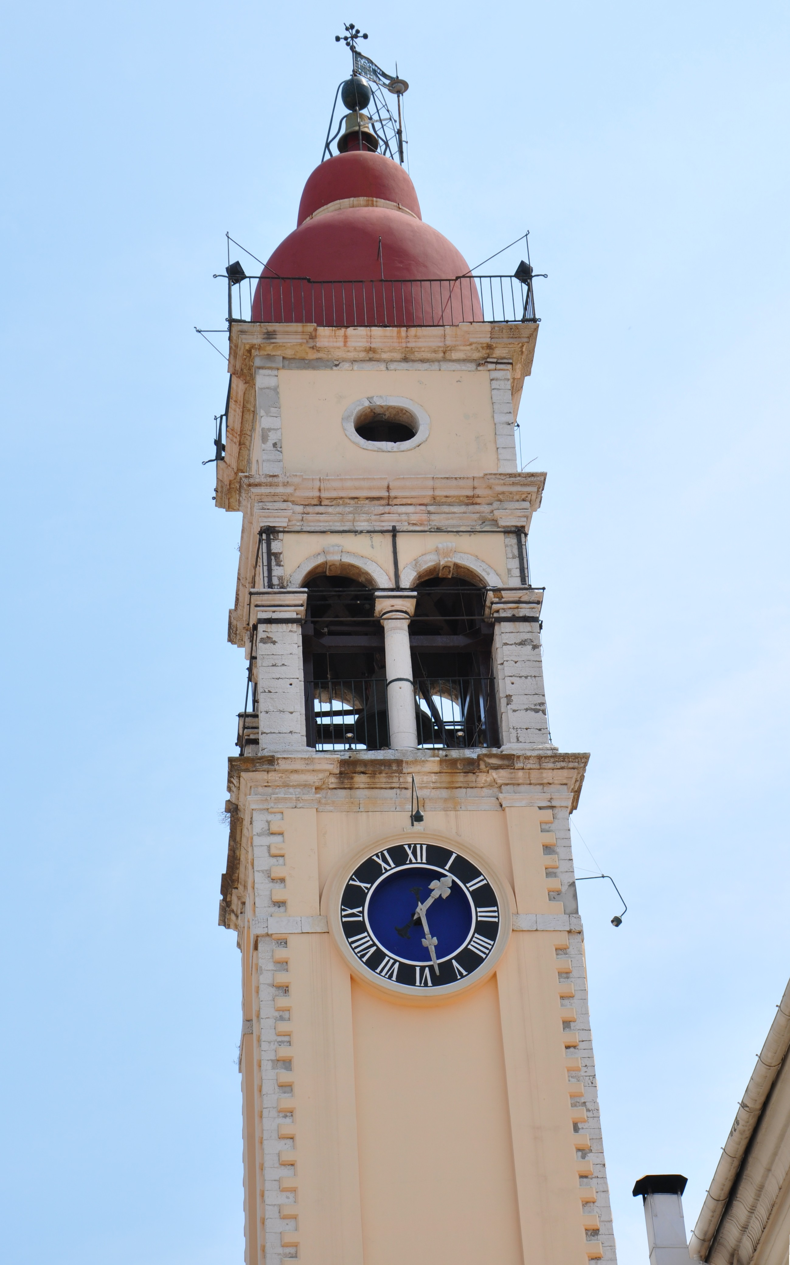 Παλαιά Πόλη Κέρκυρας«Παλαιά Πόλη Κέρκυρας»